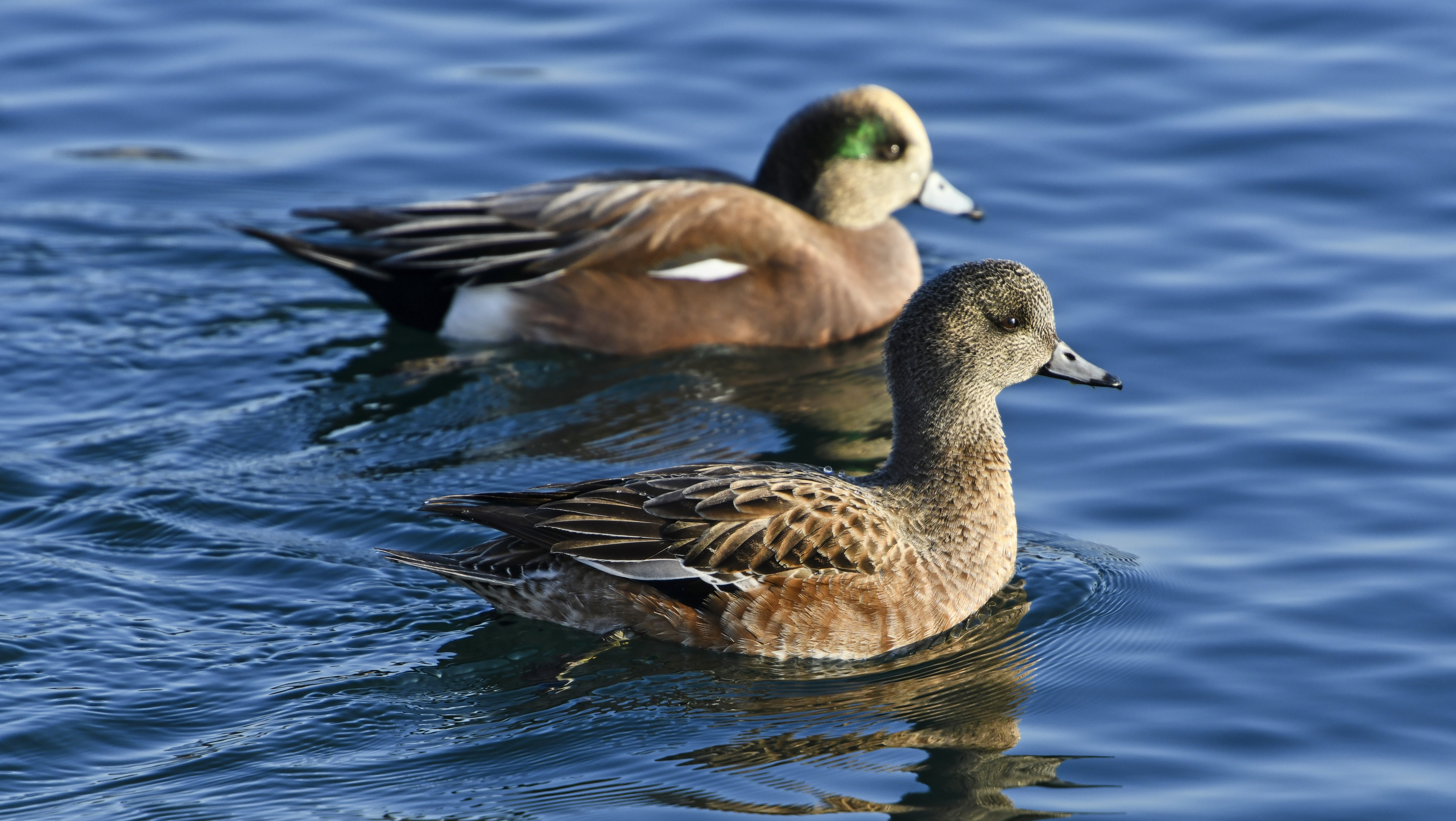 Самиця та самець свища американського (Anas americana) в Гамбер-Бей-Парку (Вест) на озері Онтаріо в Торонто